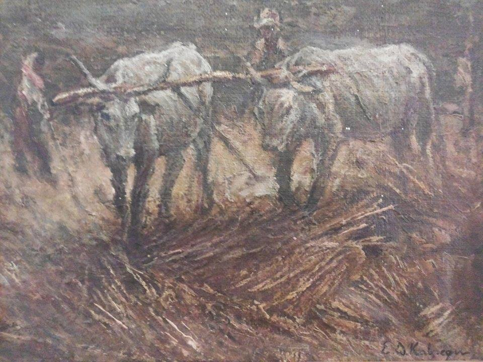 La yunta EDKabregu